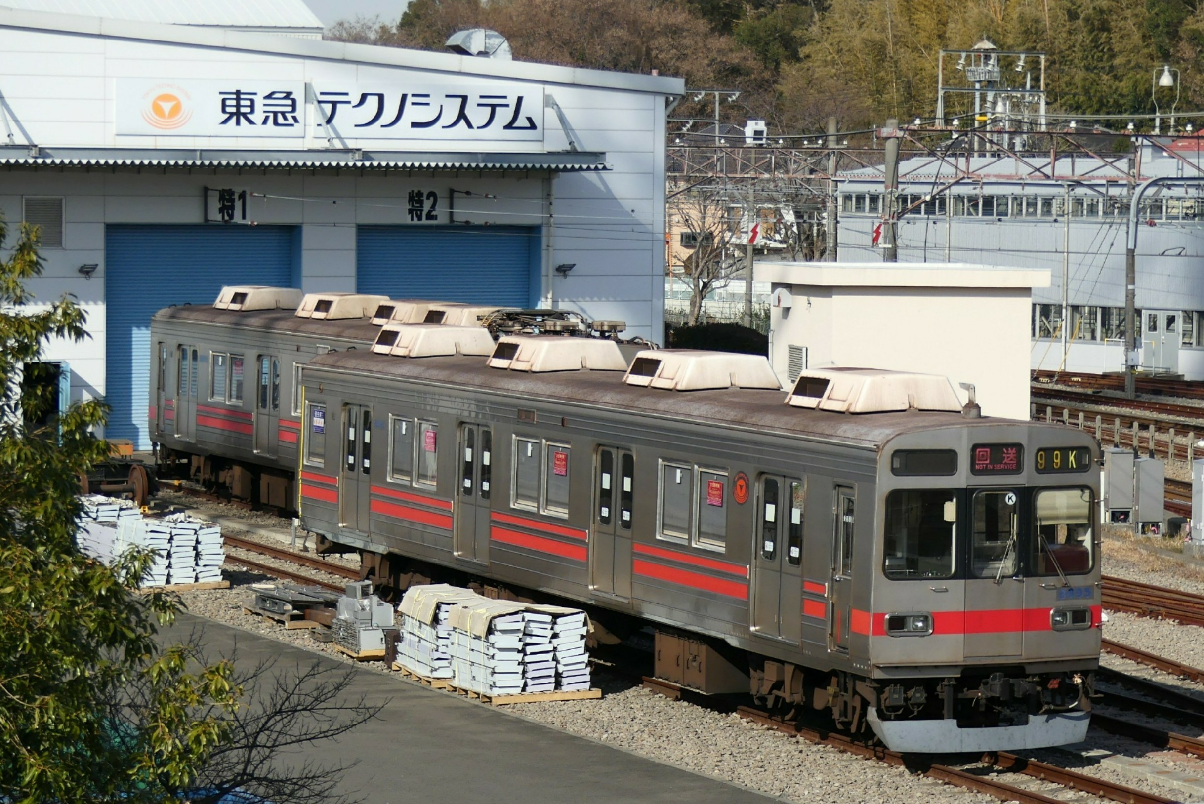 運用を終え恩田工場に入庫した8590系電車